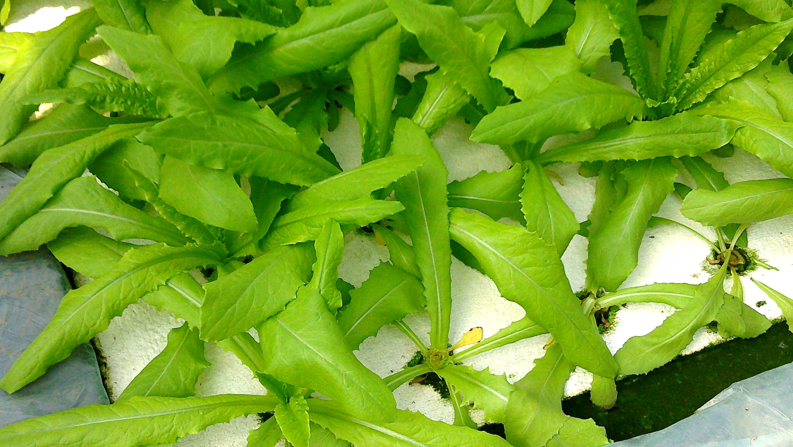 無土栽培：油麥菜